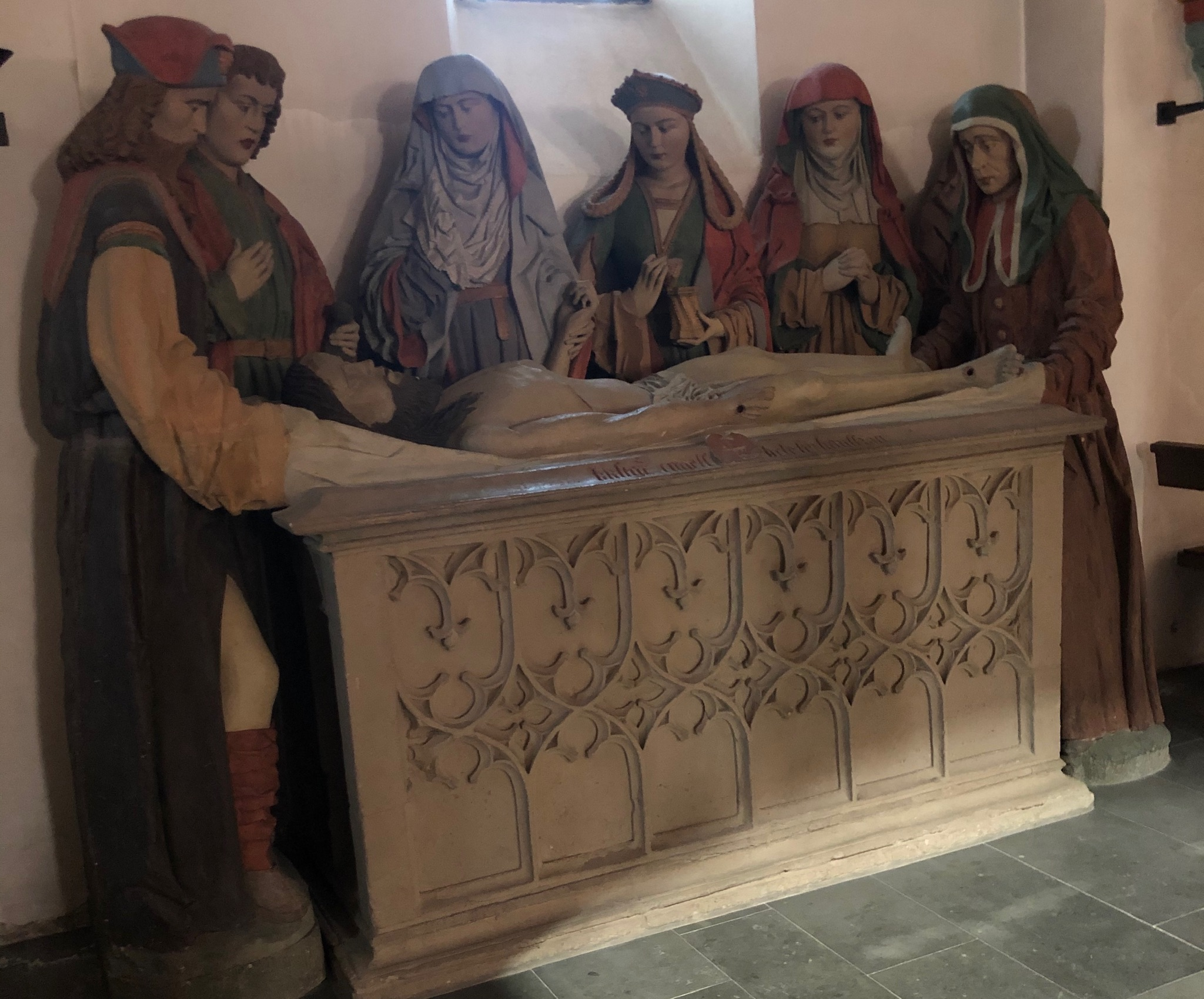 Gotische Steingrabszene in der Kirche St. Peter in Sinzig am Rhein